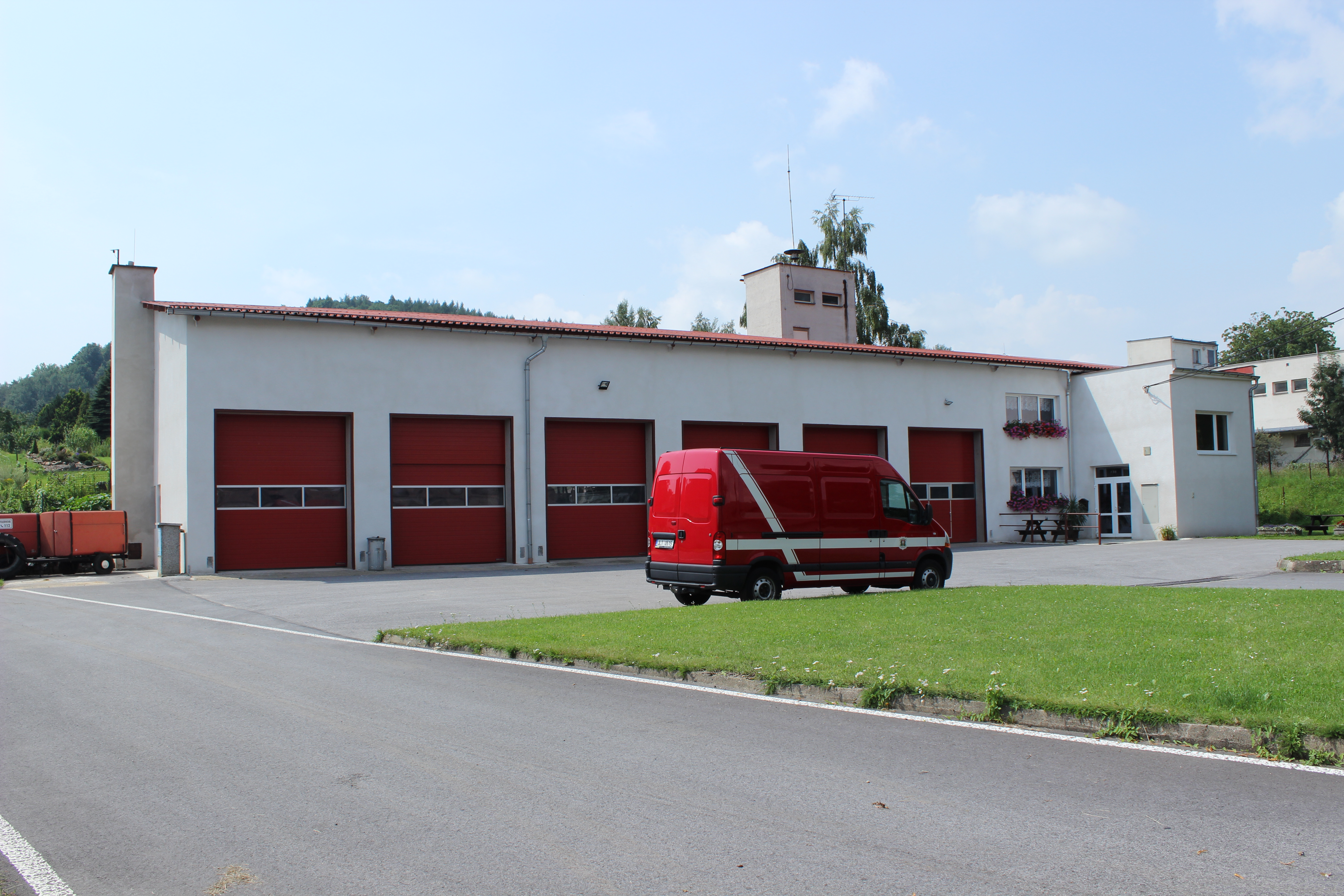 Hasičská zbrojnice (dům číslo popisné 636) v raspenavské Fučíkově ulici.